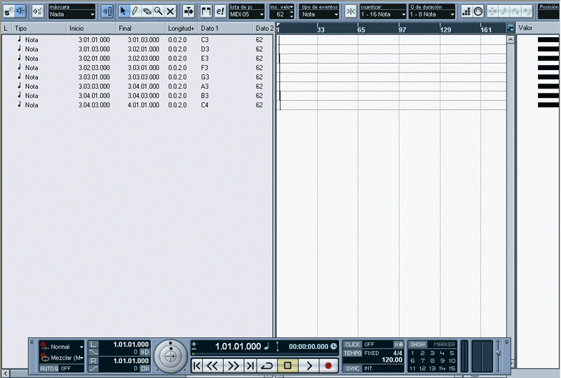 Secuenciador musical (software). Lista de eventos.